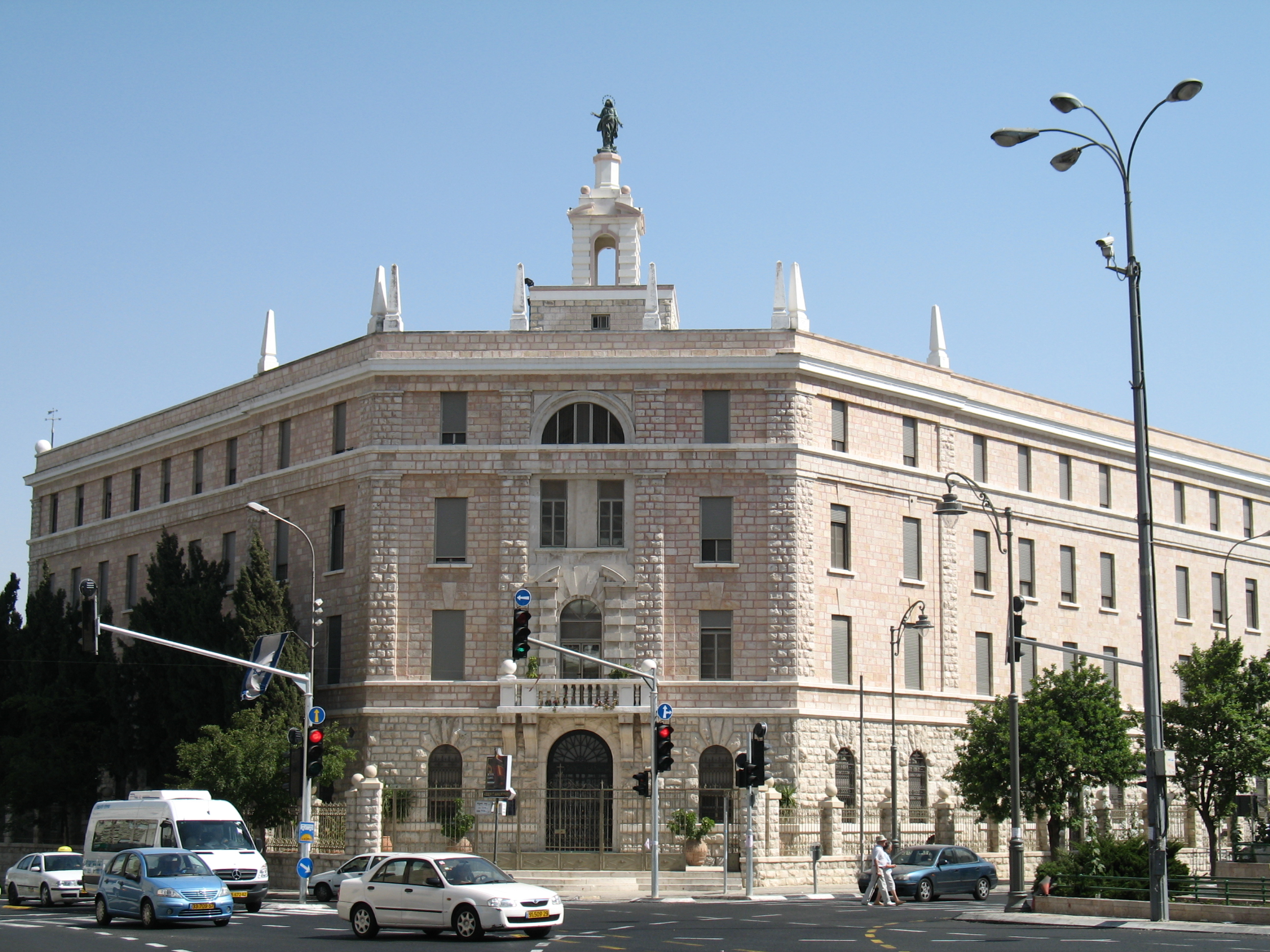 Terra Santa Building (Jerusalem, Israel)